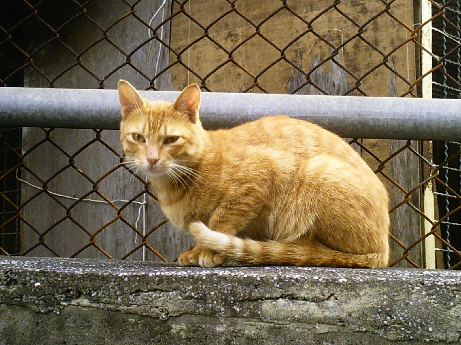 User:Smallmiew家附近的流浪貓